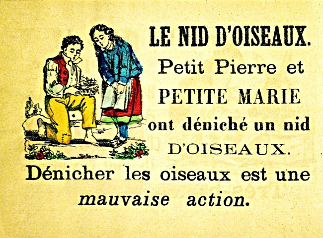 Images d'Épinal : Alphabet des enfants sages